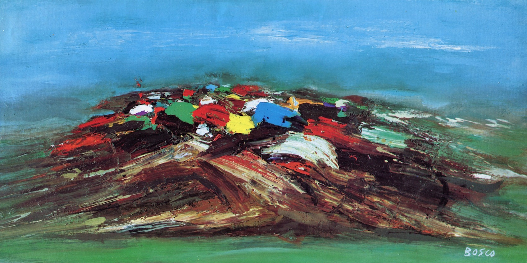 Course de chevaux, Huile sur toile